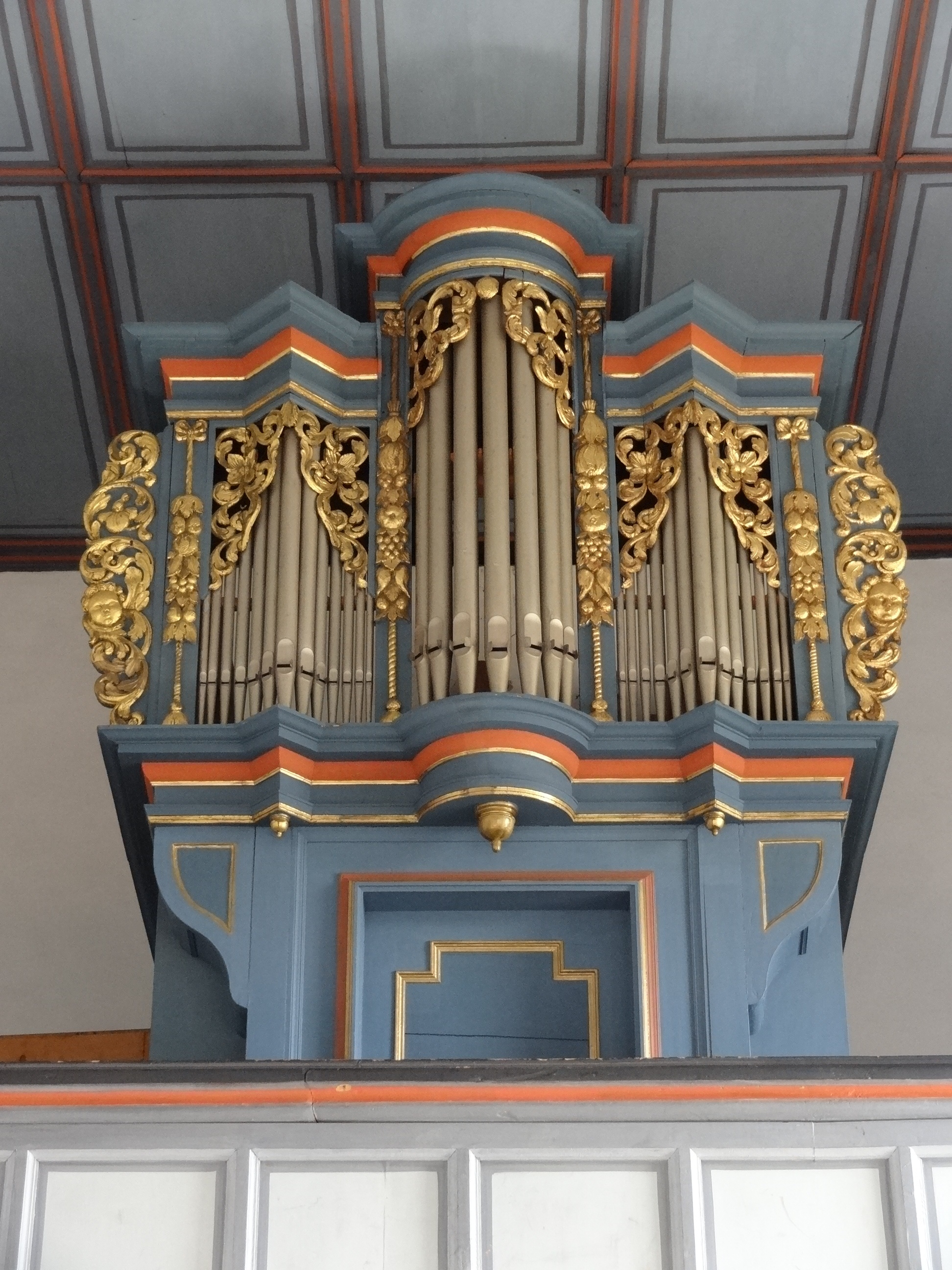 Evangelische Pfarrkirche Trais-Münzenberg